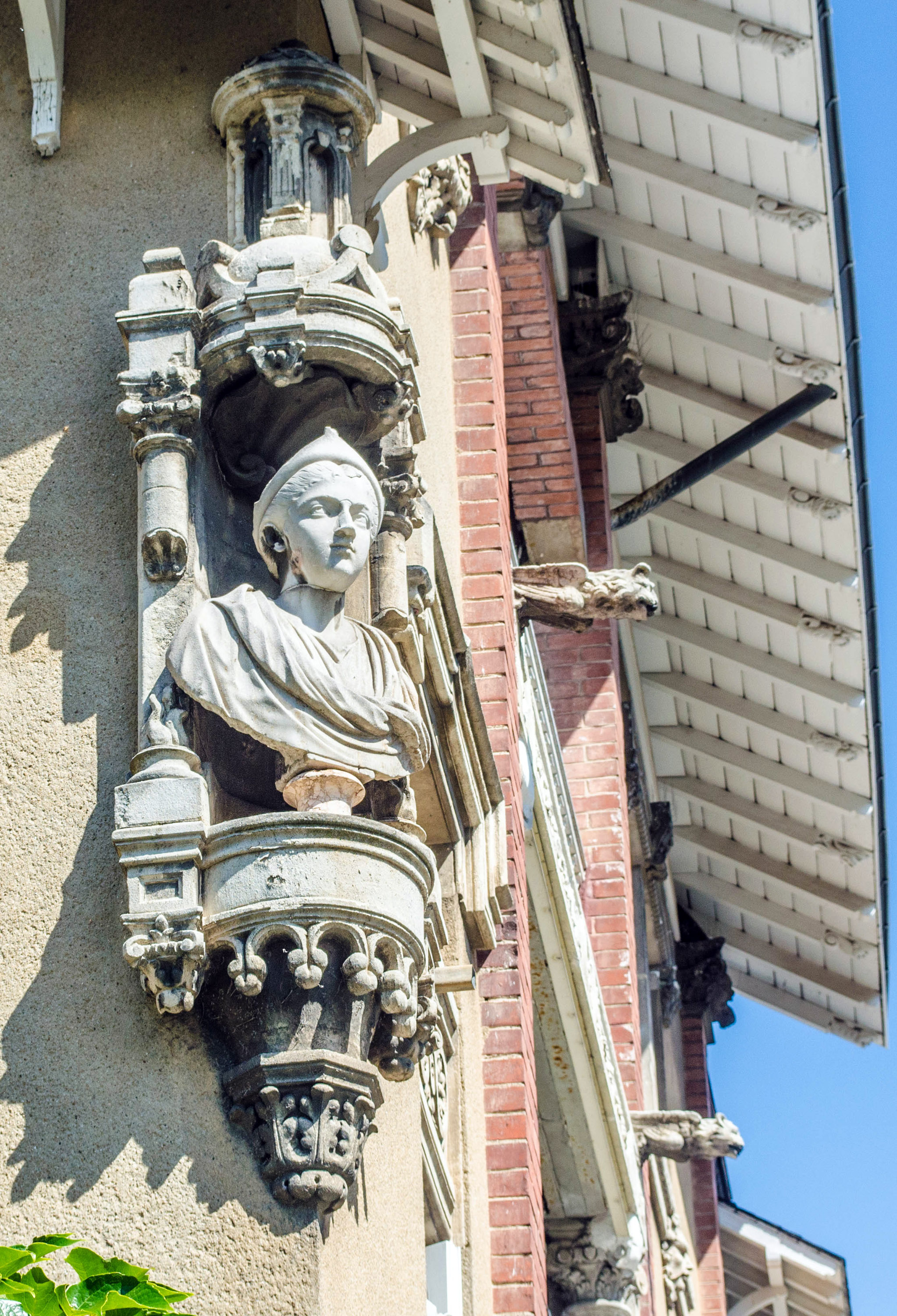 Valence (Drôme, France), Clos Genest, villa Margot, niche d’angle, gargouilles